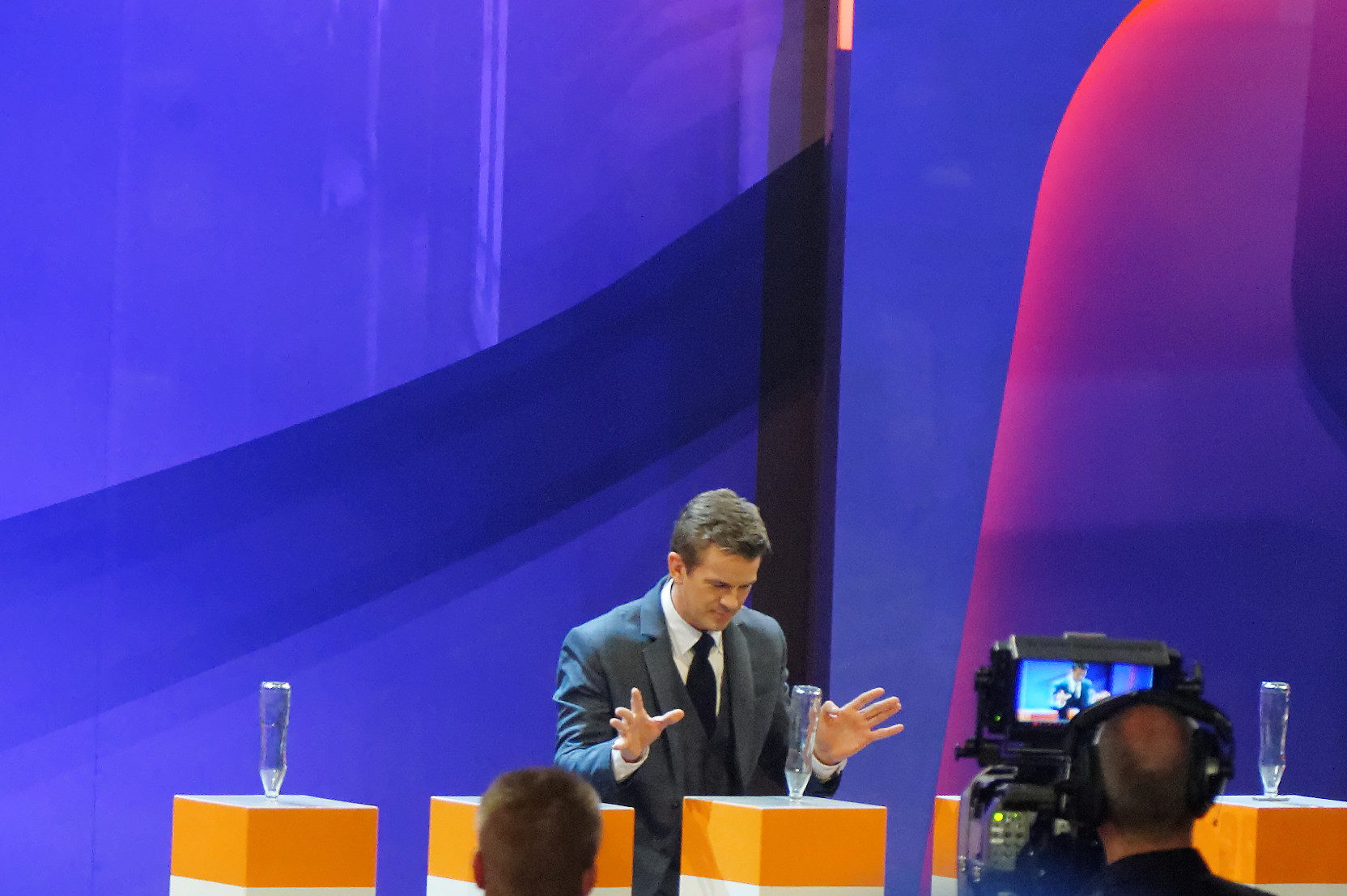 Wetten, dass.. ? am 23. März 2013 in der Stadthalle Wien The making of this document was supported by Wikimedia Austria. Markus Lanz bei der so genannten Lanz-Challenge